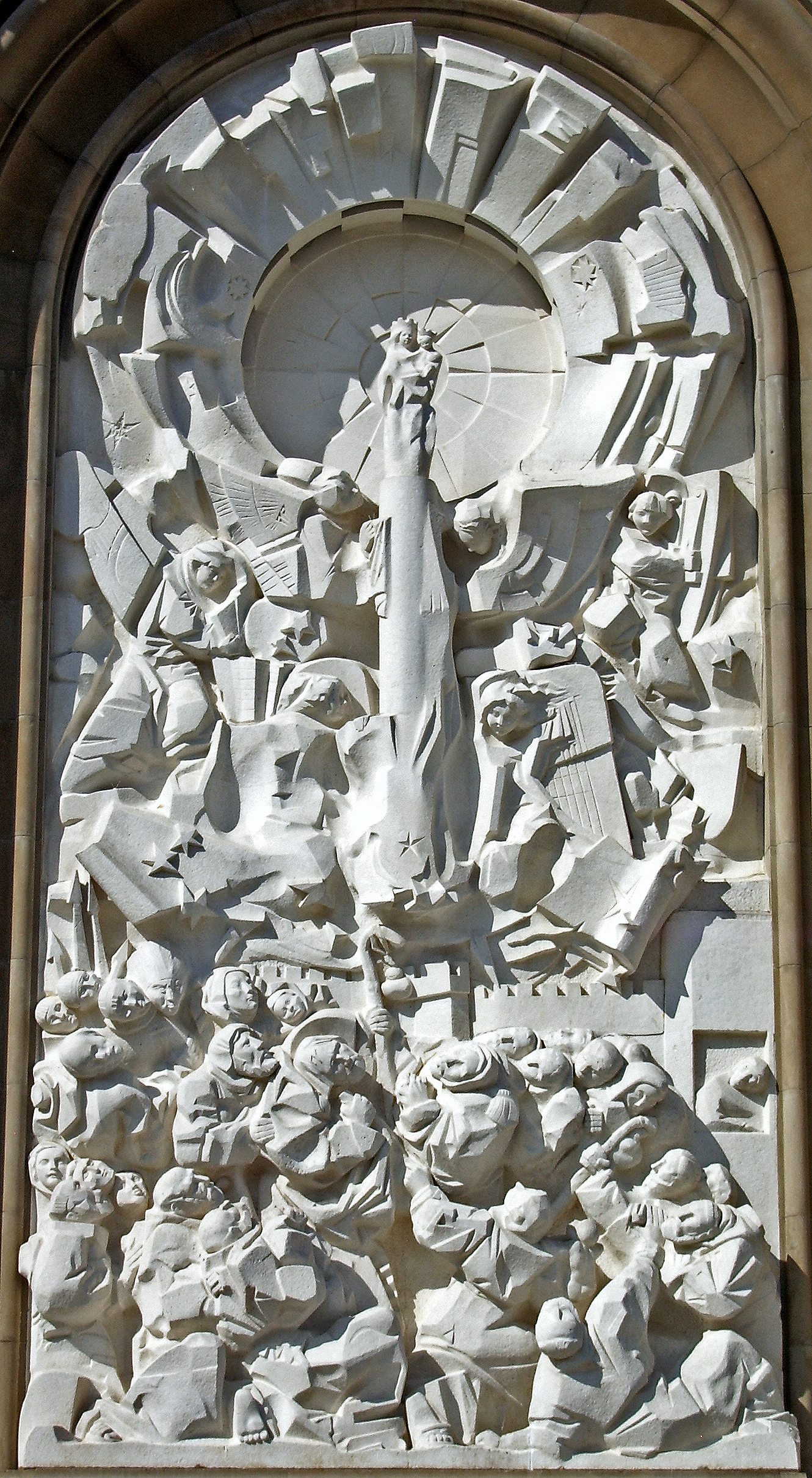 Venida de la Virgen del Pilar (Pablo Serrano, 1969) Relieve de la Fachada de la Basílica de Nuestra Señora del Pilar de Zaragoza, España.